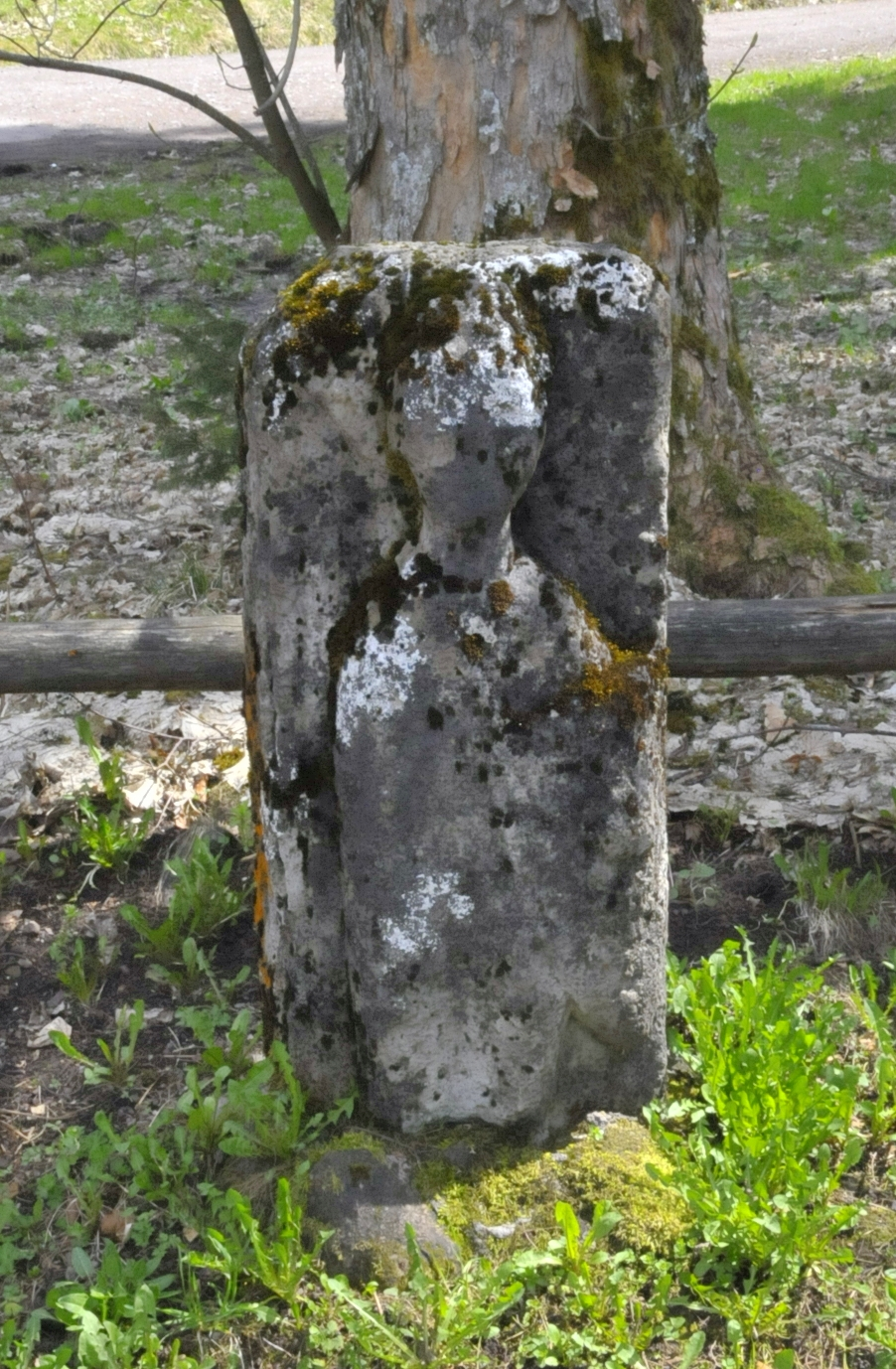 Mönchsstein beim Mönchhof in Thüringen